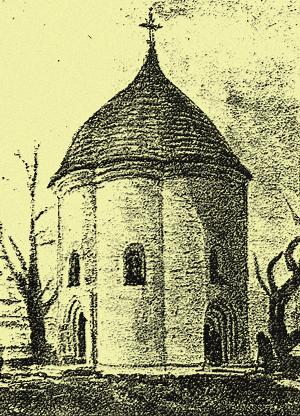 Реконструкція зовнішнього вигляду Василівської ротонди у Володимирі.